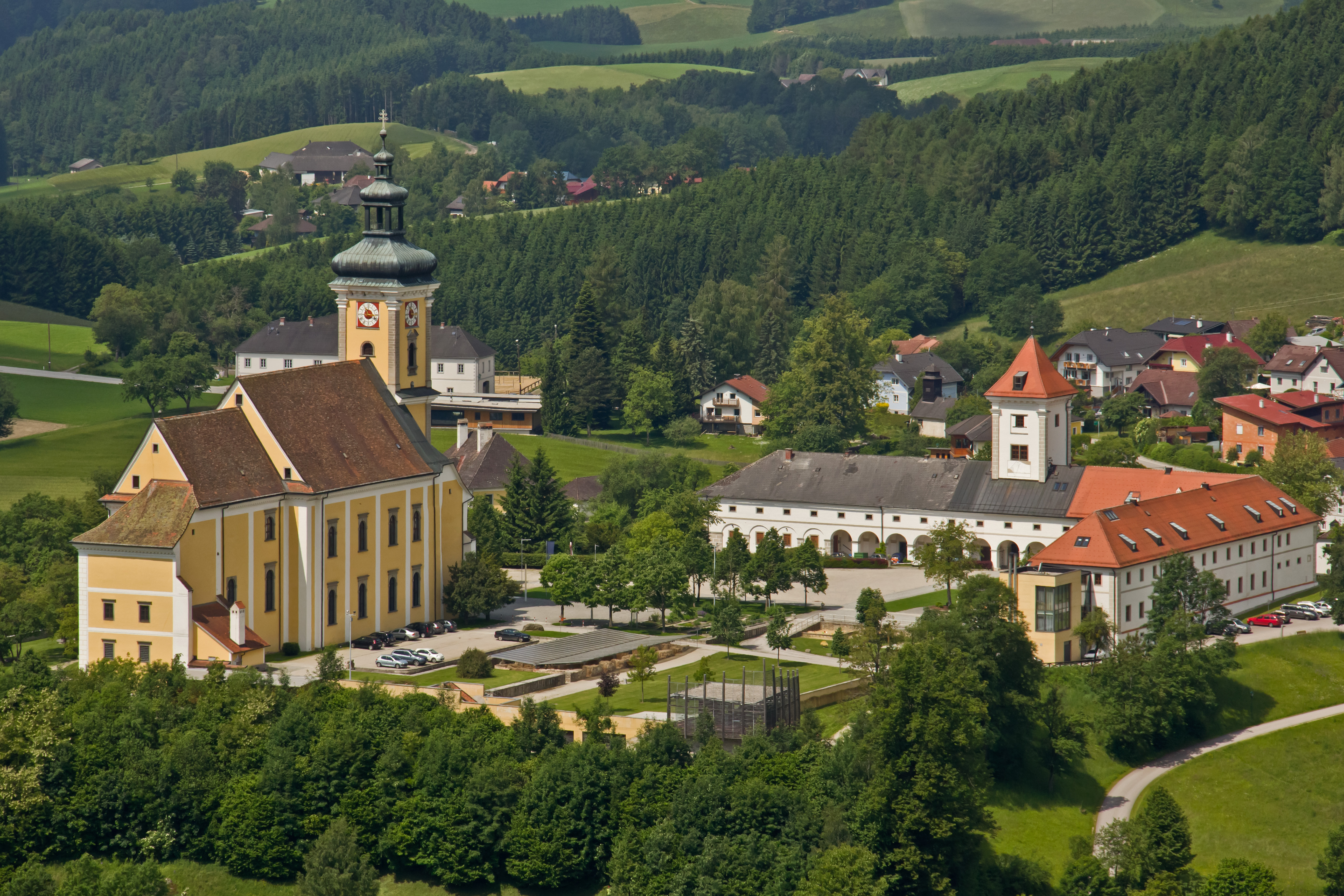 Gesamtanlage ehemaliges Stift Waldhausen, vom Heimkehrerkreuz aus gesehn